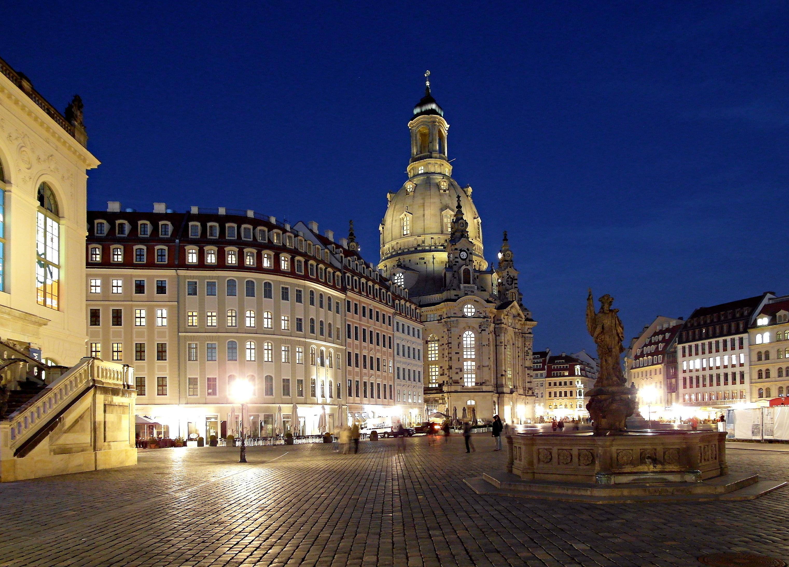 18.10.2012 01067 Dresden: Neumarkt mit Frauenkirche (GMP: 51.051905,13.741545) und Friedensbrunnen (Türkenbrunnen). [SAM2476.JPG]20121018605MDR.JPG(c)Blobelt